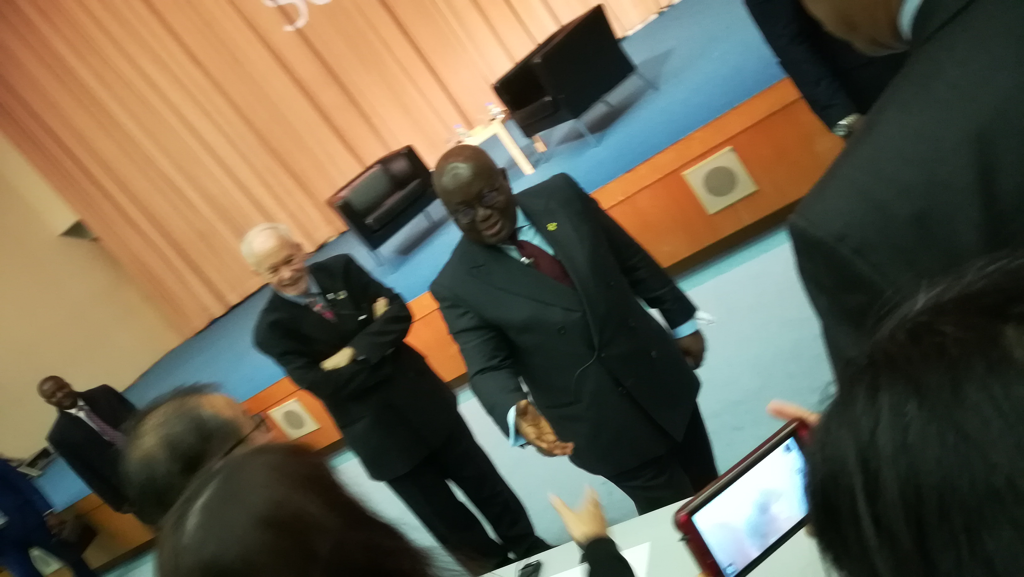 アクフォアド ガーナ共和国大統領 国連大学にて